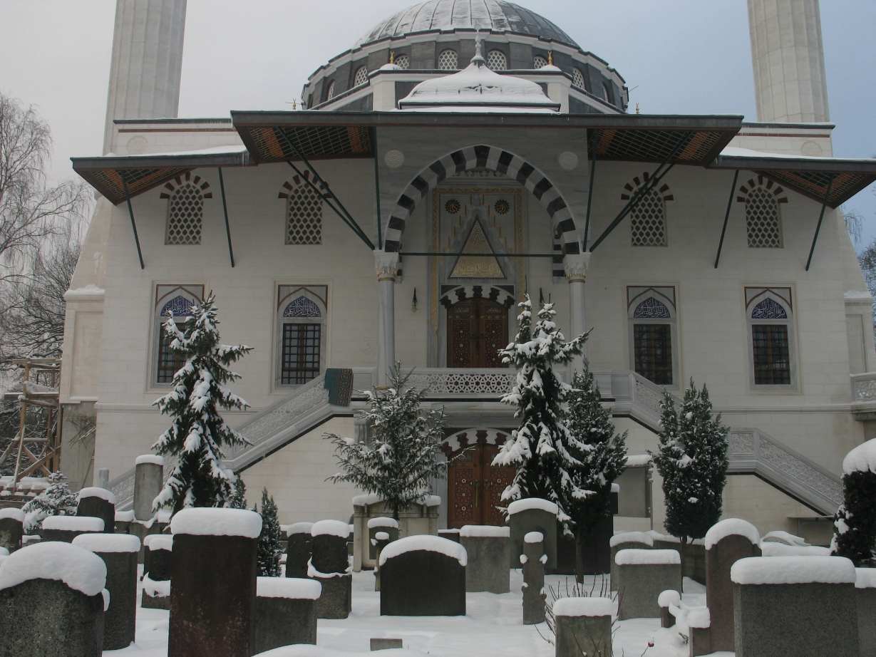 Moschee mit Grabsteinen in Berlin